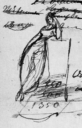 А. С. Пушкин. Портрет гр. А. Ф. Закревской. 1828 г. 26 мая. Рис. чернилами на листе со списком стихотворения «Дар напрасный, дар случайный:». С пометой Пушкина: «1828 г. 26 мая». Пушкинский Дом. Санкт-Петербург. Тетрадь 80. Л. 1. По атрибуции А. М. Эфроса